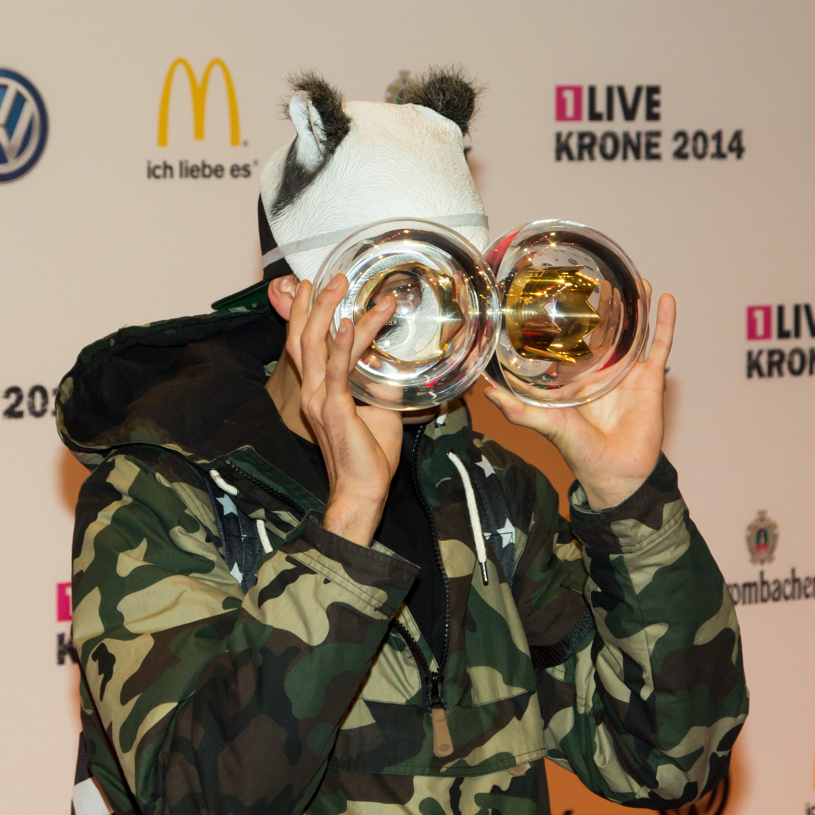 1LIVE Krone 2014 in der Bochumer Jahrhunderthalle: Cro mit Krone